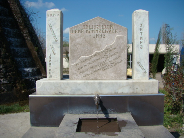 Bərdə rayonu Yeni Daşkənd kəndinin girişində, Bərdə-Tərtər yolu üzərində Şair Məmmədhüseyn bulağı